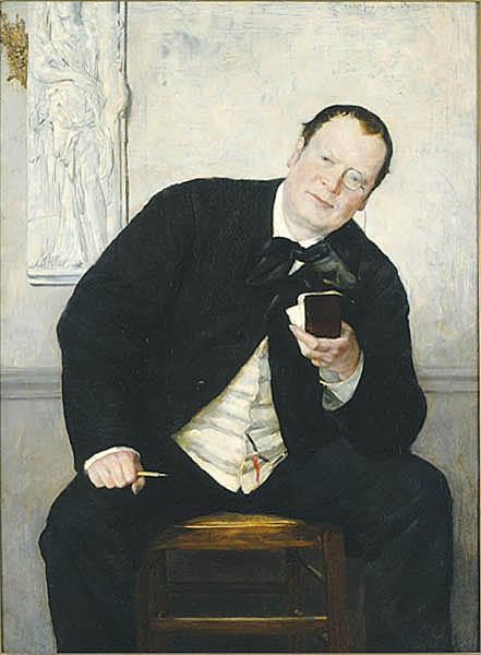 Journalisten Godfrey Renholm, 1880, Ernst Josephson (1851-1906)